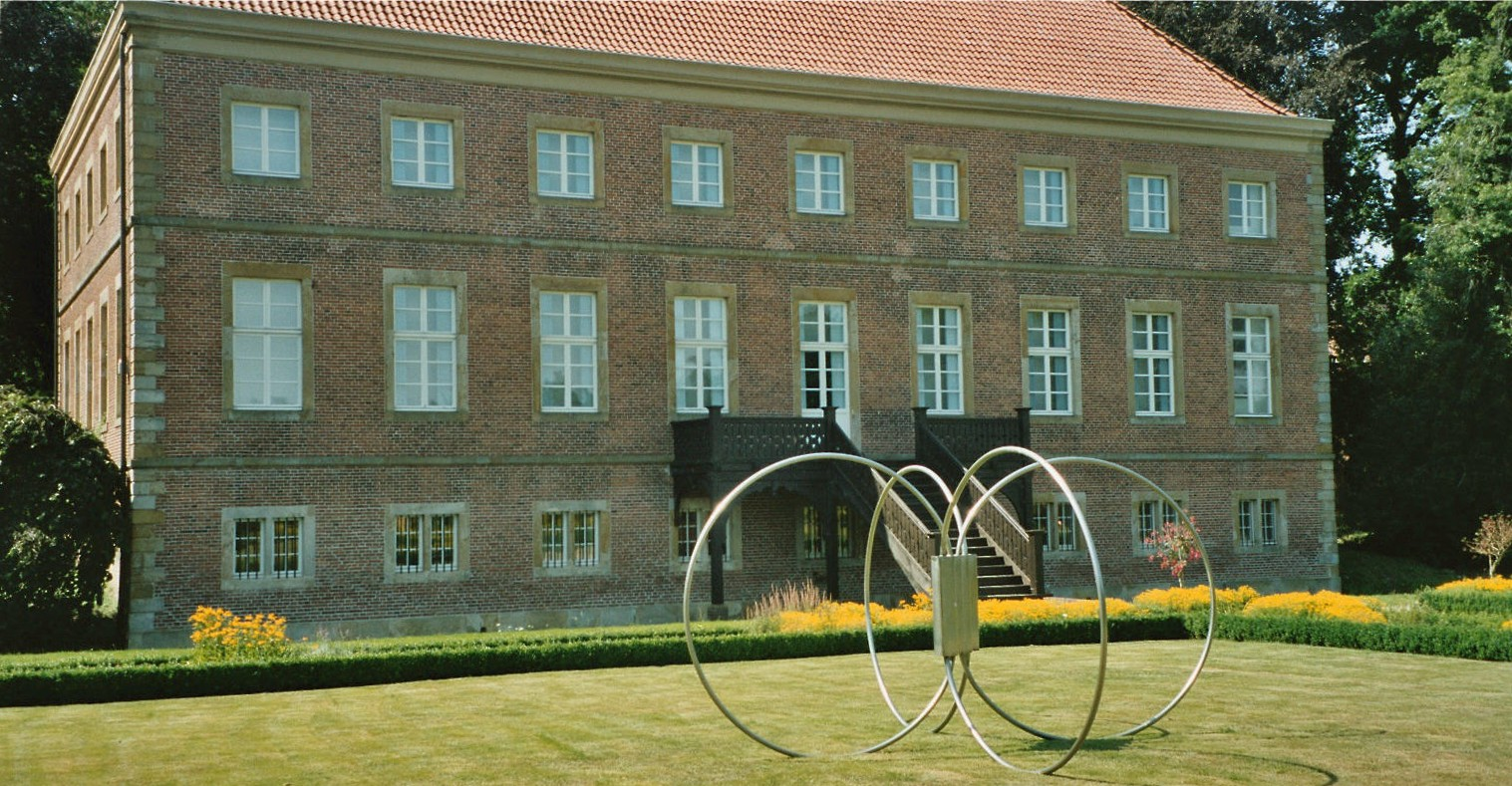 Gutshaus des Guts Altenkamp in Aschendorf/Ems